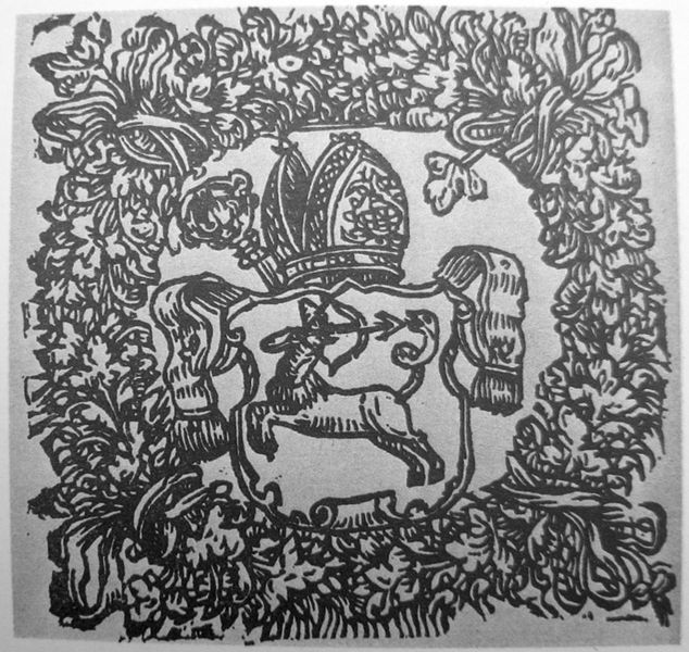 Экслібрыс Паўла Гальшанскага.